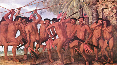 Dança dos Tarairiú. ECKHOUT, Albert. Óleo sobre tela, s.d., 168x294 cm. Museu Nacional da Dinamarca, Copenhague. Reprodução fotográfica: autoria desconhecida.